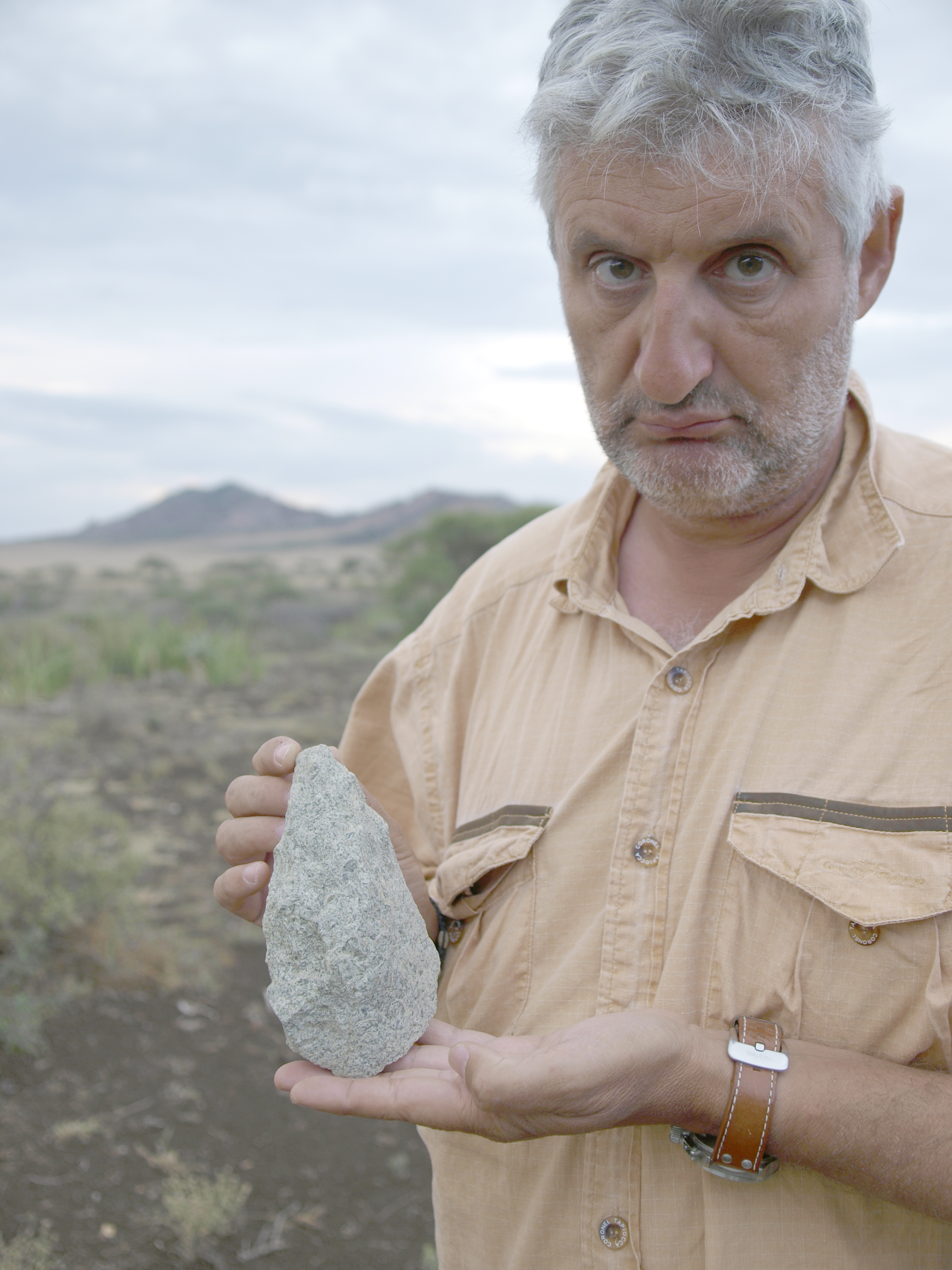 Enrique Baquedano posando en Olduvai con un bifaz de tipo amigdaloide en la Garganta de Olduvai (Tanzania) Junio de 2012. Foto tomada por Javier Trueba